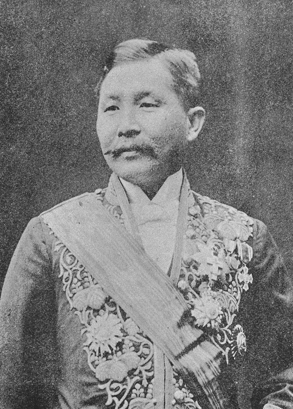 Portrait of Inagaki Manjiro (稲垣満次郎, 1861 – 1908)